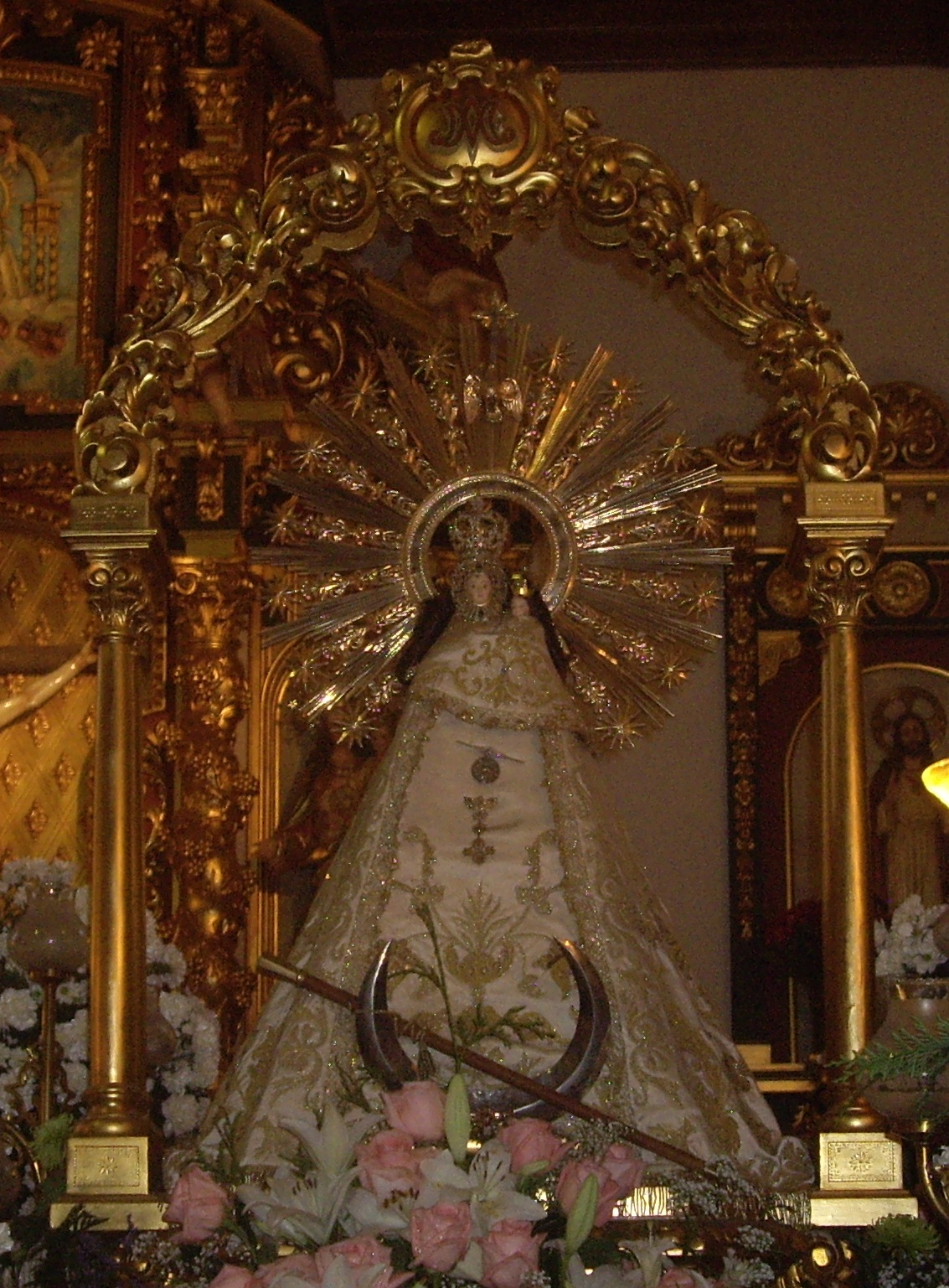 esta en la carroza